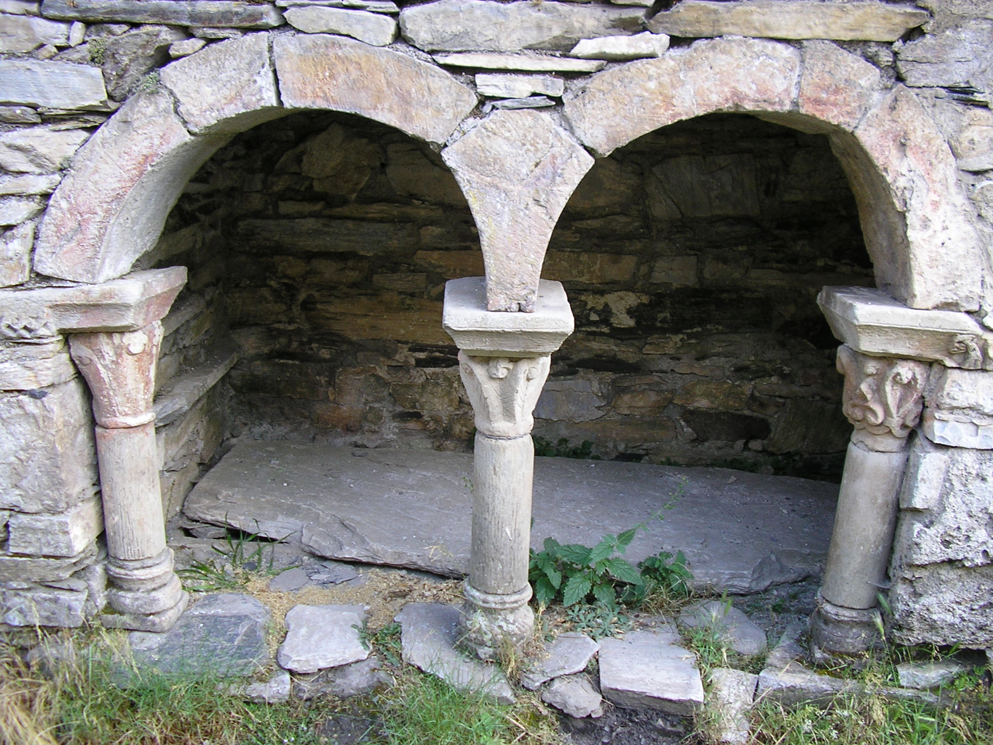 Iglesia de Santiago de Peñalba - Sepulcro de San Fortis